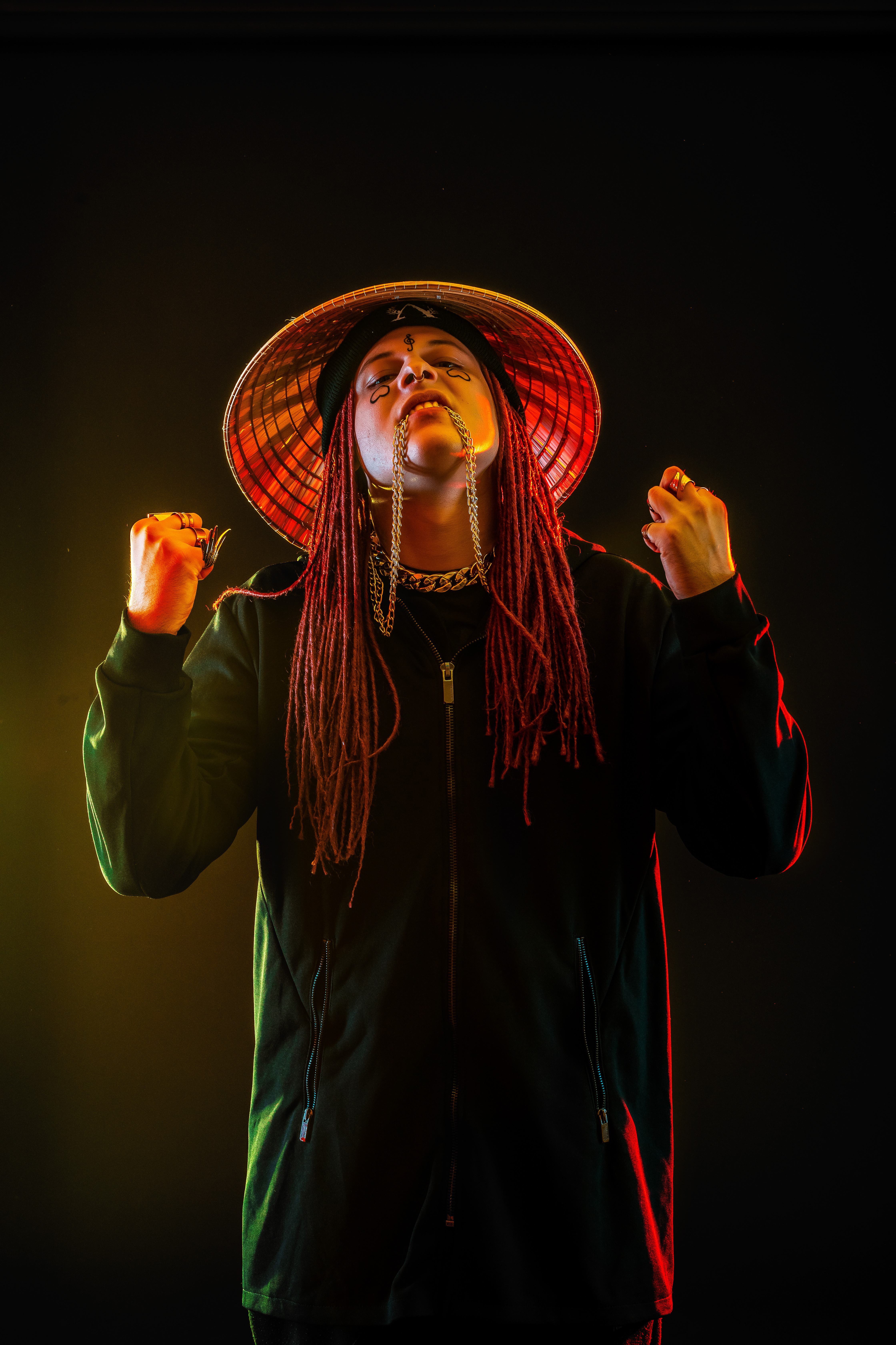 Srpski (latinica): Kendi (reper)